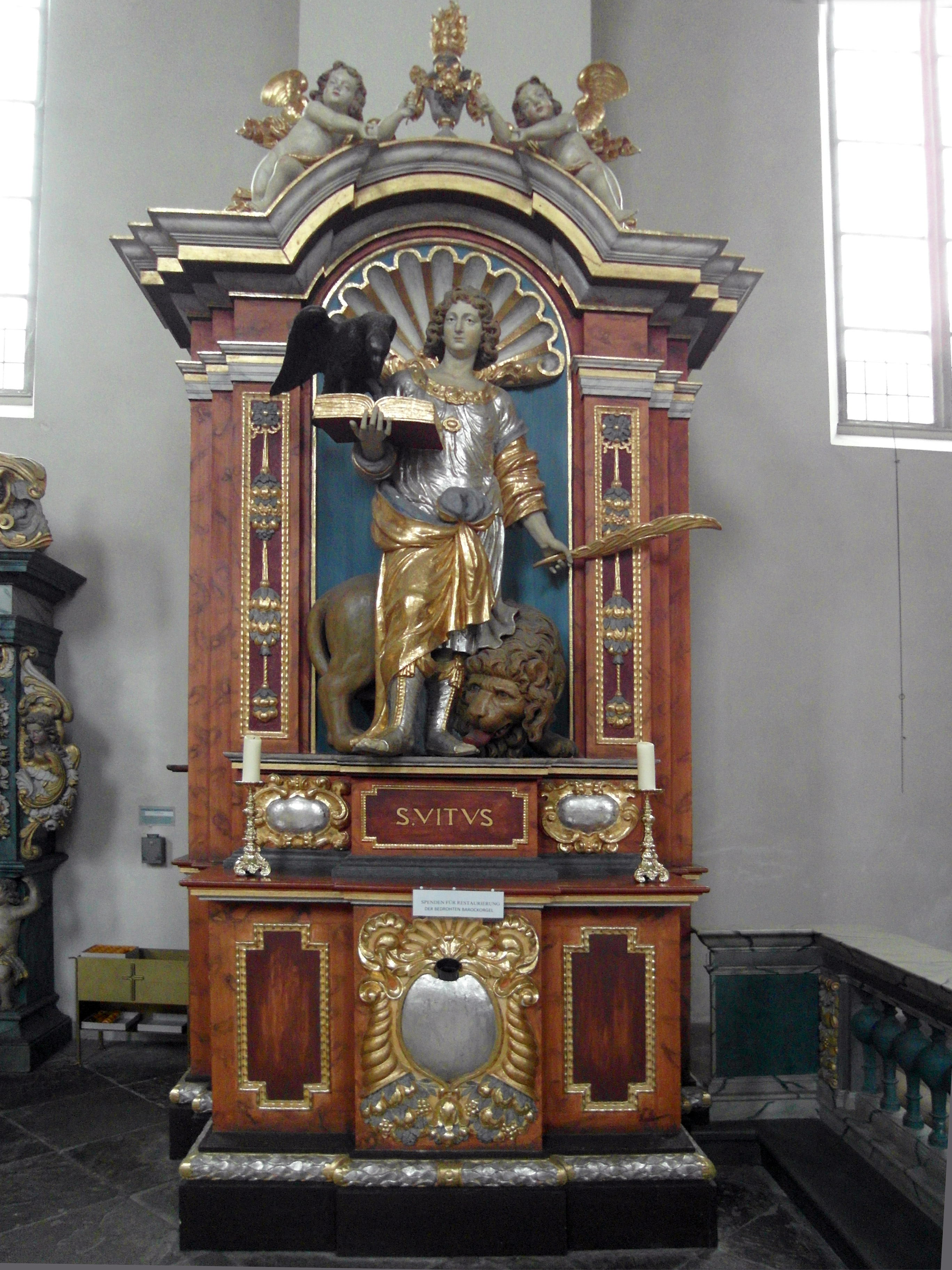 Das Vitusmonument in der Kirche von Corvey bei Höxter